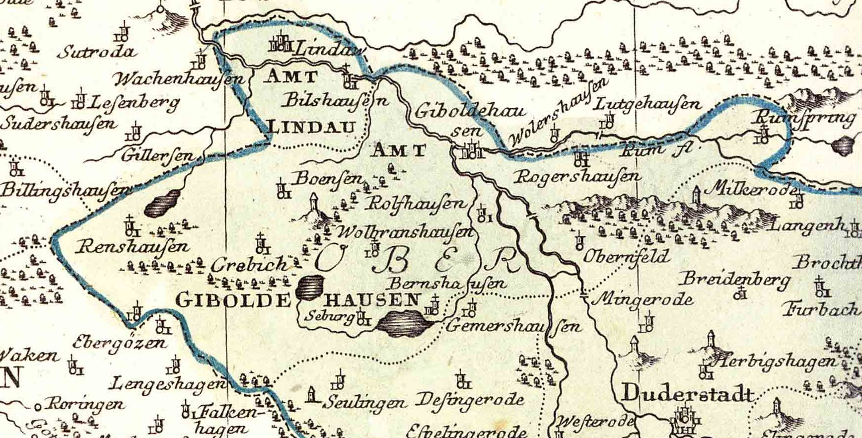 Ausschnitt aus der historischen Karte "Tractus Eichsfeldiae": das Amt Gieboldehausen